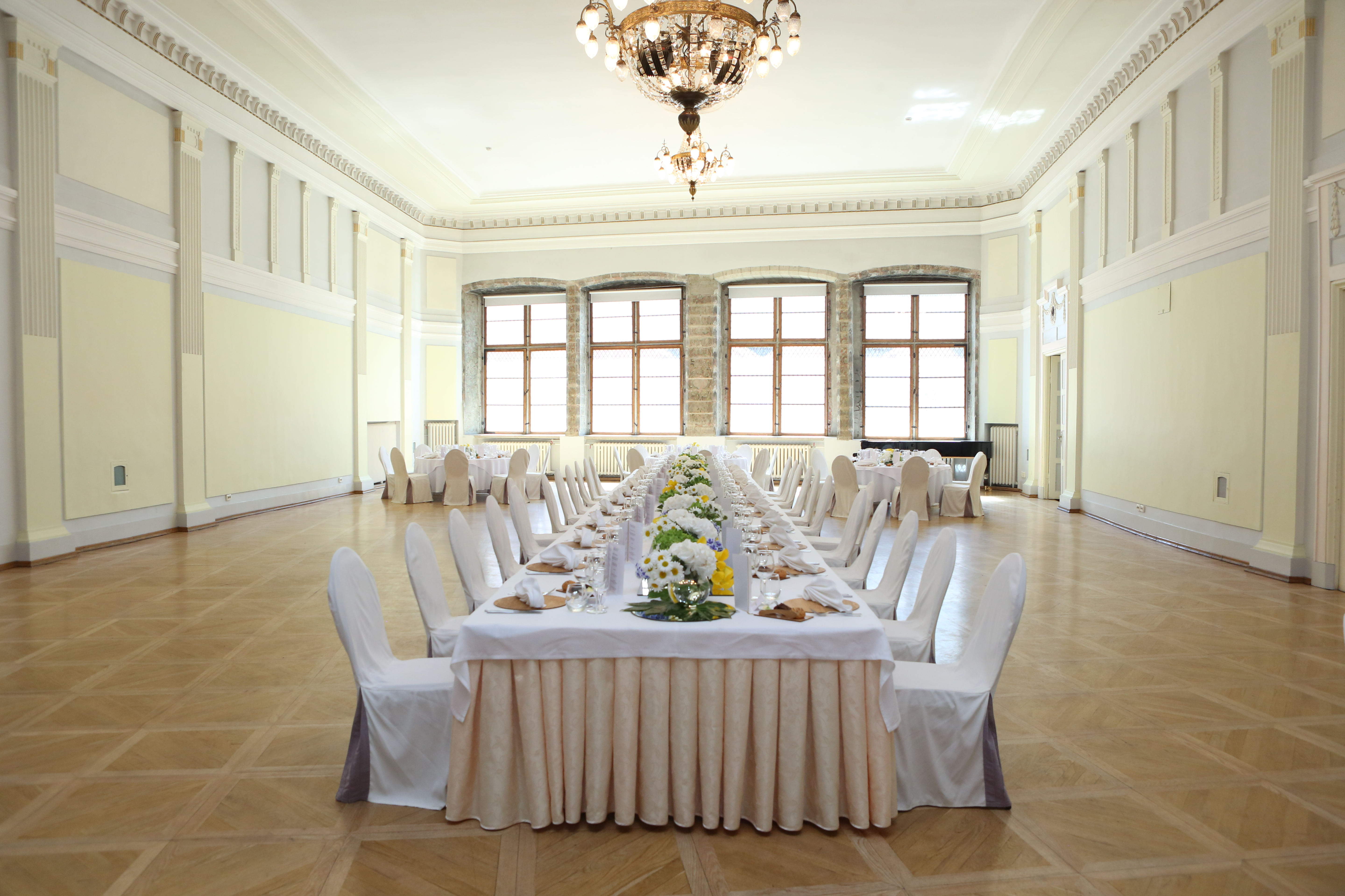 Mustpeade maja valge saal